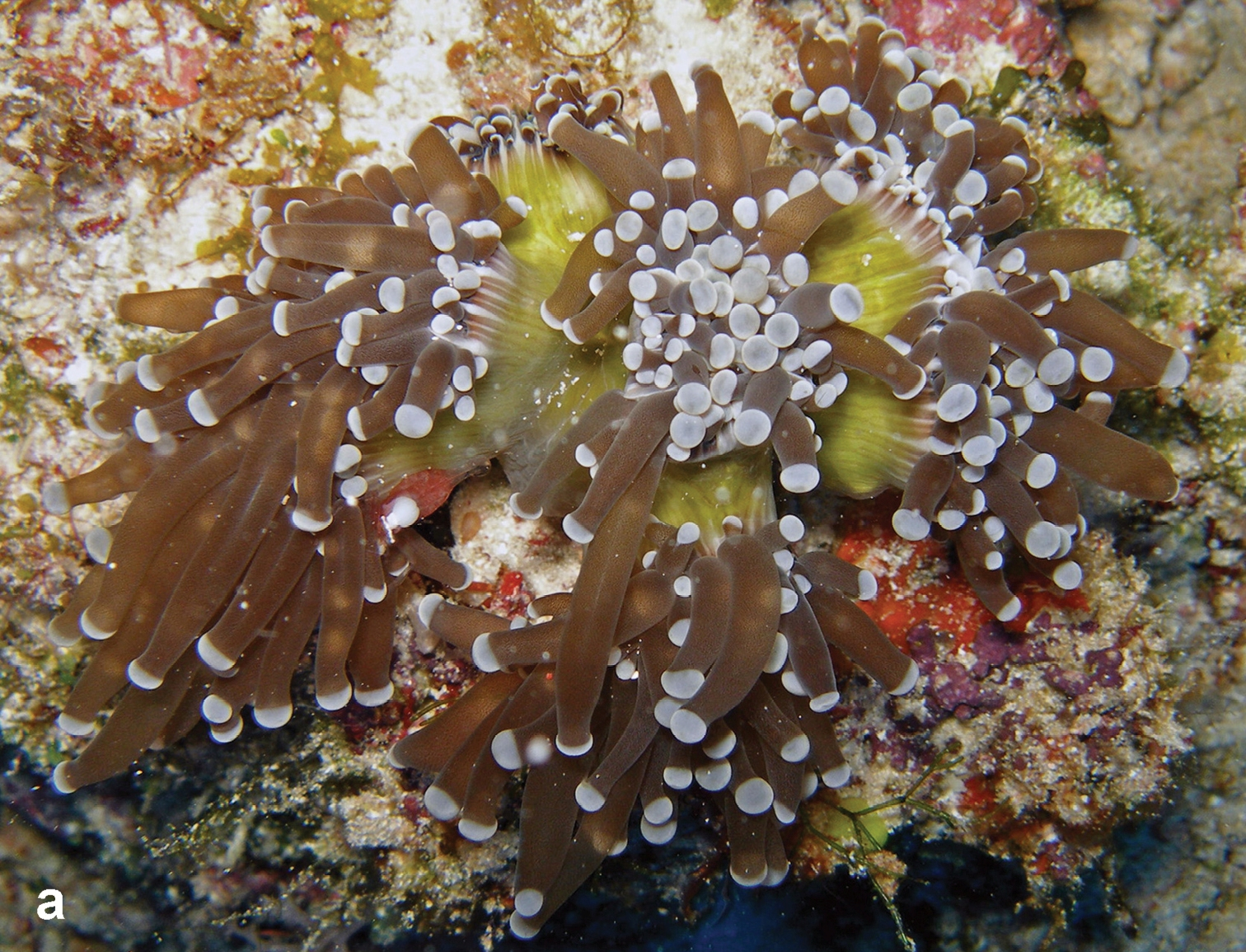 Euphyllia glabrescens, en Pulau Layang-Layang, islas Spratly, 2013.